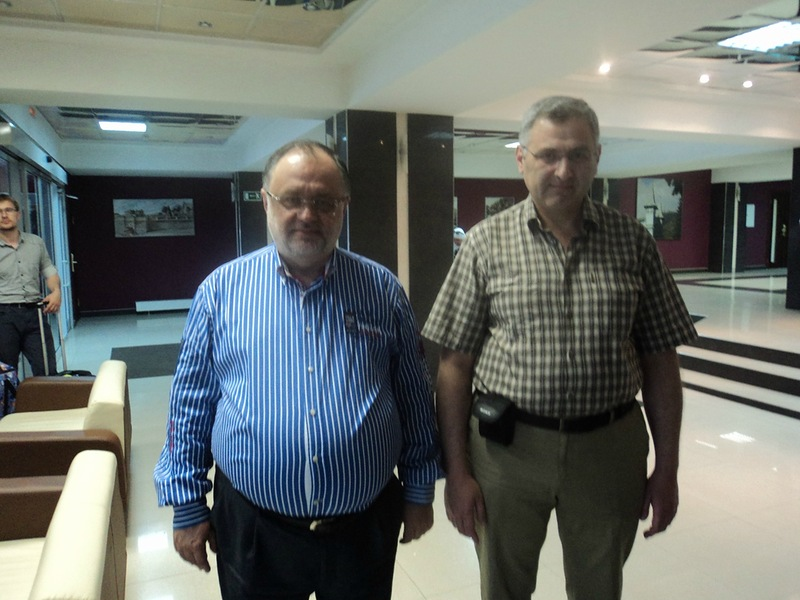 Aydın Əlizadə və doktor Vyaçeslav Polosin. Pyatiqorsk şəhəri, "Moskva ilahiyyat deklarasiyası işığında İslam, cəmiyyət dövlət" adlı elmi konfransda, 28 iyun 2013 2013-06-28